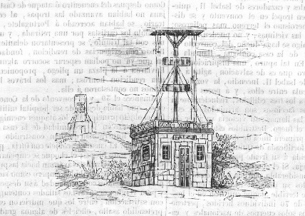 Telégrafo óptico utilizado durante la Primera Guerra Carlista. España - Grabado